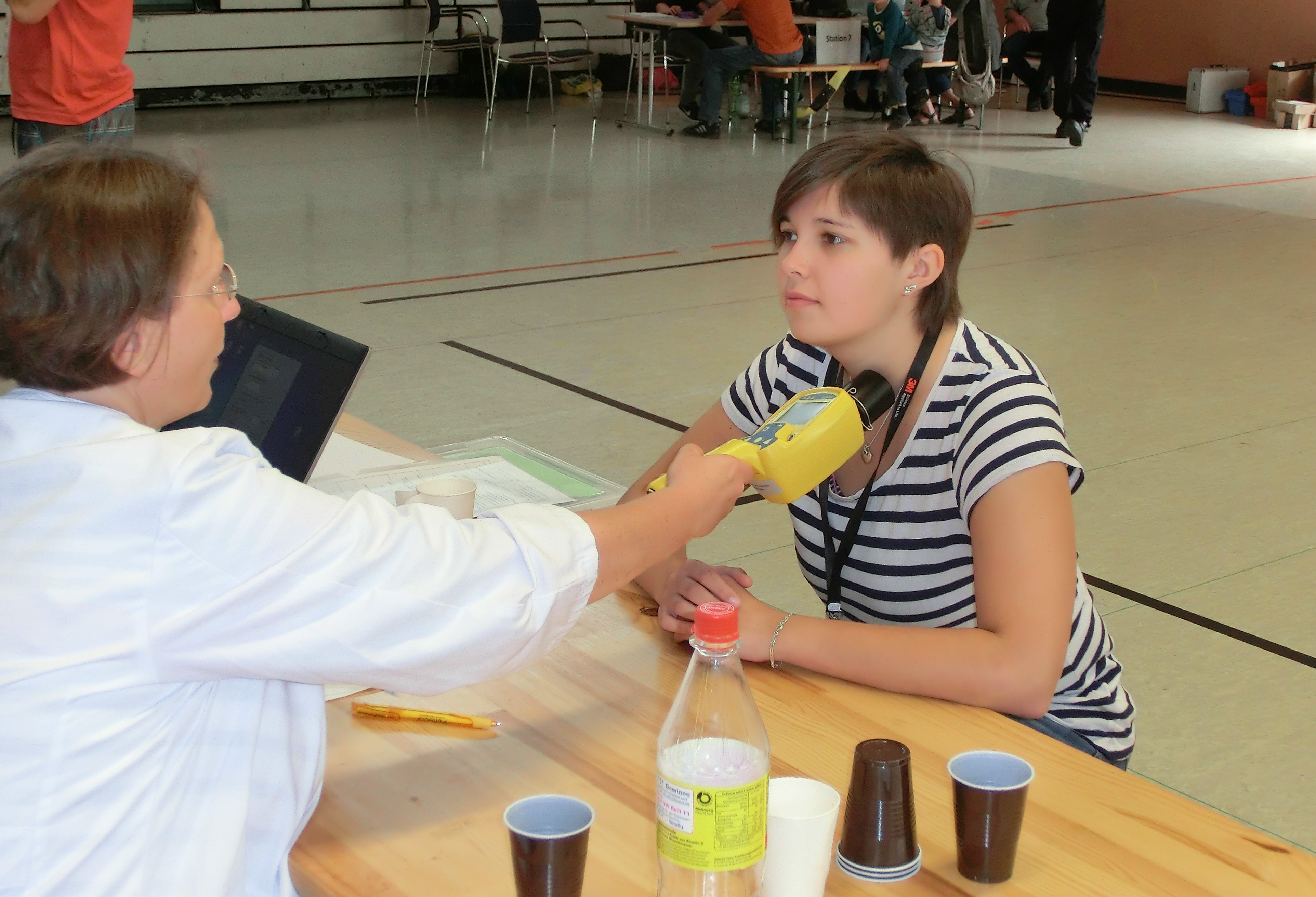 Überprüfung der Schilddrüsenbelastung mit einem Aktivitätsmessgerät in einer Notfallstation. Fachliche Kontrolle und Beurteilung durch Mediziner. Diese Messung ist ein Entscheidungskriterium für die Einnahme von Jodtabletten nach einem KKW-Unfall.